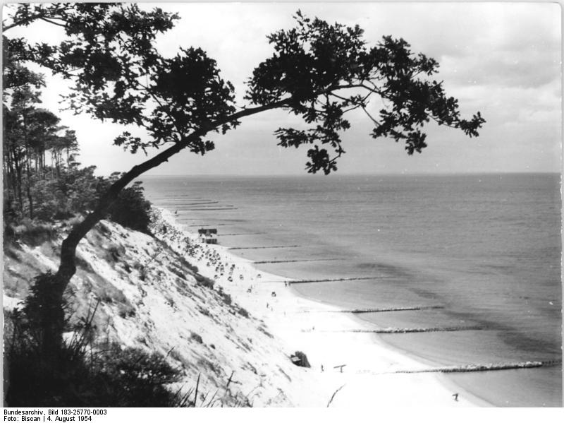 Koserow, Blick vom Streckelberg Zentralbild Biscan Wjk-Ku. 3 Motive 4.8.1954 Zum Gesetz zur Erhaltung und Pflege der heimatlichen Natur (Naturschutzgesetz) Ein Berg war in Gefahr Der Streckelberg bei Koserow ist die höchste Erhebung auf der Ostseeinsel Usedom. Der Berg ist ein wertvolles Naturdenknal. Er war gegen die anstürmende See 50 Jahre lang durch eine Betonmauer geschützt. Vor einigen Jahren zorbarst in Sturmtagen dieser Schutzwall, weil unter dem Hitlerregime nichts für die Instandhaltung getan wurde. Bei Sturm riss die See bis zu zehn Meter Land aus dem Berg. Der Vernichtungsarbeit der See wurde jetzt durch Ausbesserung der Bühnen vor dem Streckelberg Einhalt geboten. Den Naturfreunden wird der Streckelberg erhalten. UBz: "Über drei Kilometer zieht sich das Buhnensystem vor dem gefährdeten Streckelberg hin. Es muss aber ständig ausgebessert werden, um weitere Schäden zu unterbinden.